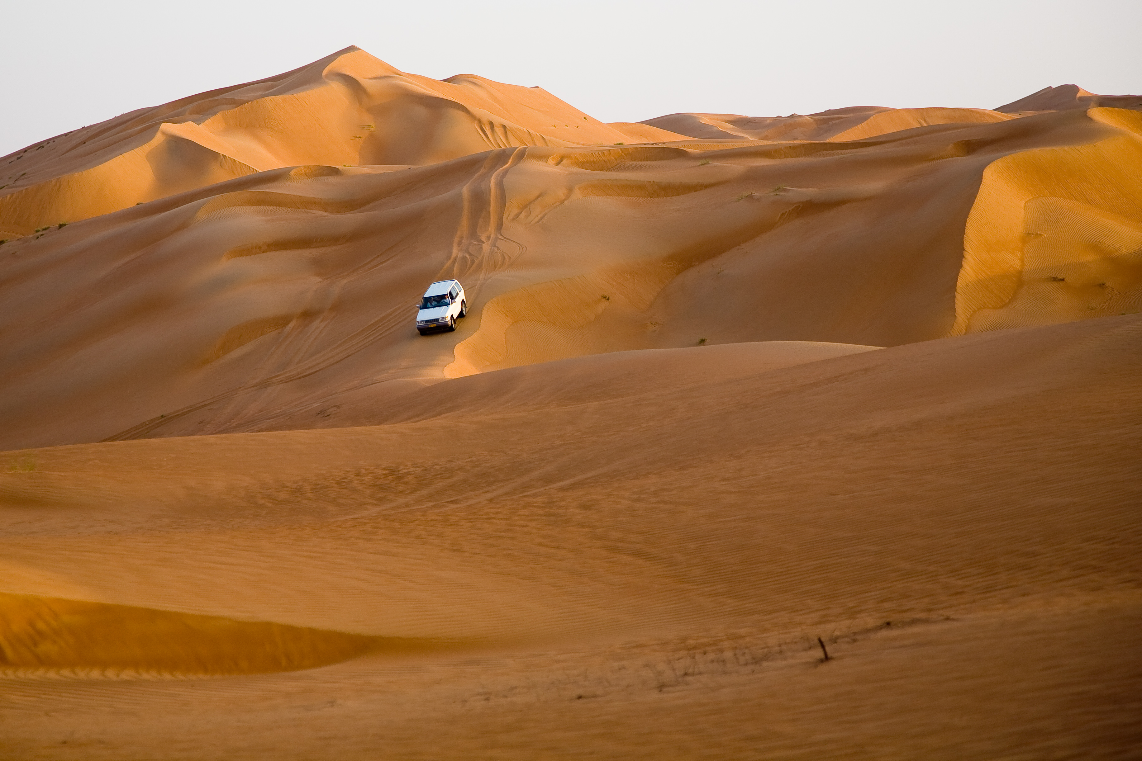 Wahiba Sands, Oman